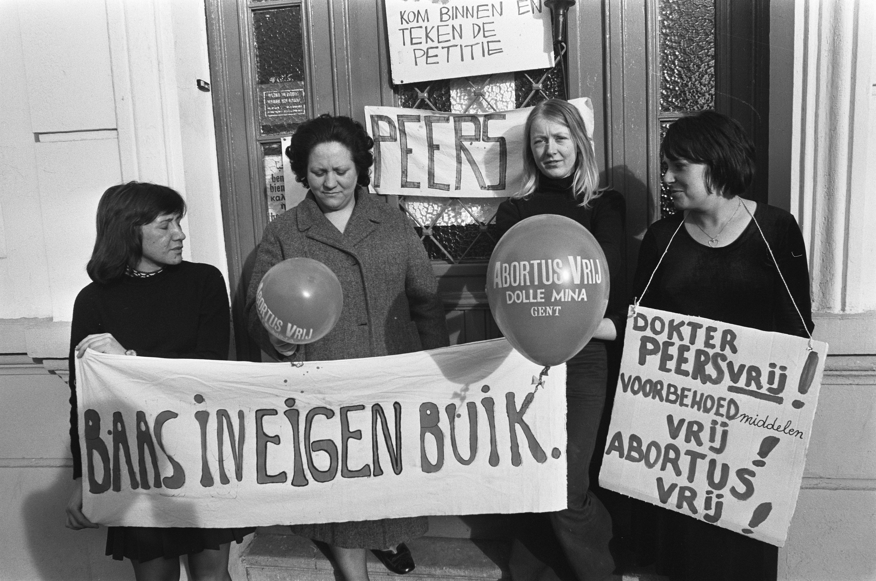 Collectie / Archief : Fotocollectie Anefo Reportage / Serie : [ onbekend ] Beschrijving : Hongerstaking in Gent (Belgie) i.v.m. arrestatie dr. Willy Peers die abortussen heeft gepleegd, vier vrouwelijk hongerstakers met protestborden Datum : 22 januari 1973 Locatie : België, Gent Trefwoorden : hongerstakingen, vrouwen Fotograaf : Verhoeff, Bert / Anefo Auteursrechthebbende : Nationaal Archief Materiaalsoort : Negatief (zwart/wit) Nummer archiefinventaris : bekijk toegang 2.24.01.05 Bestanddeelnummer : 926-1702